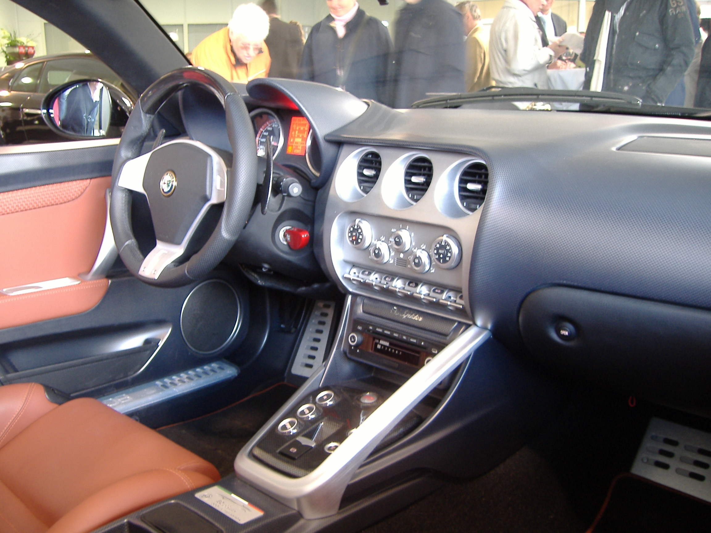 Alfa Romeo 8C Spider Cockpit